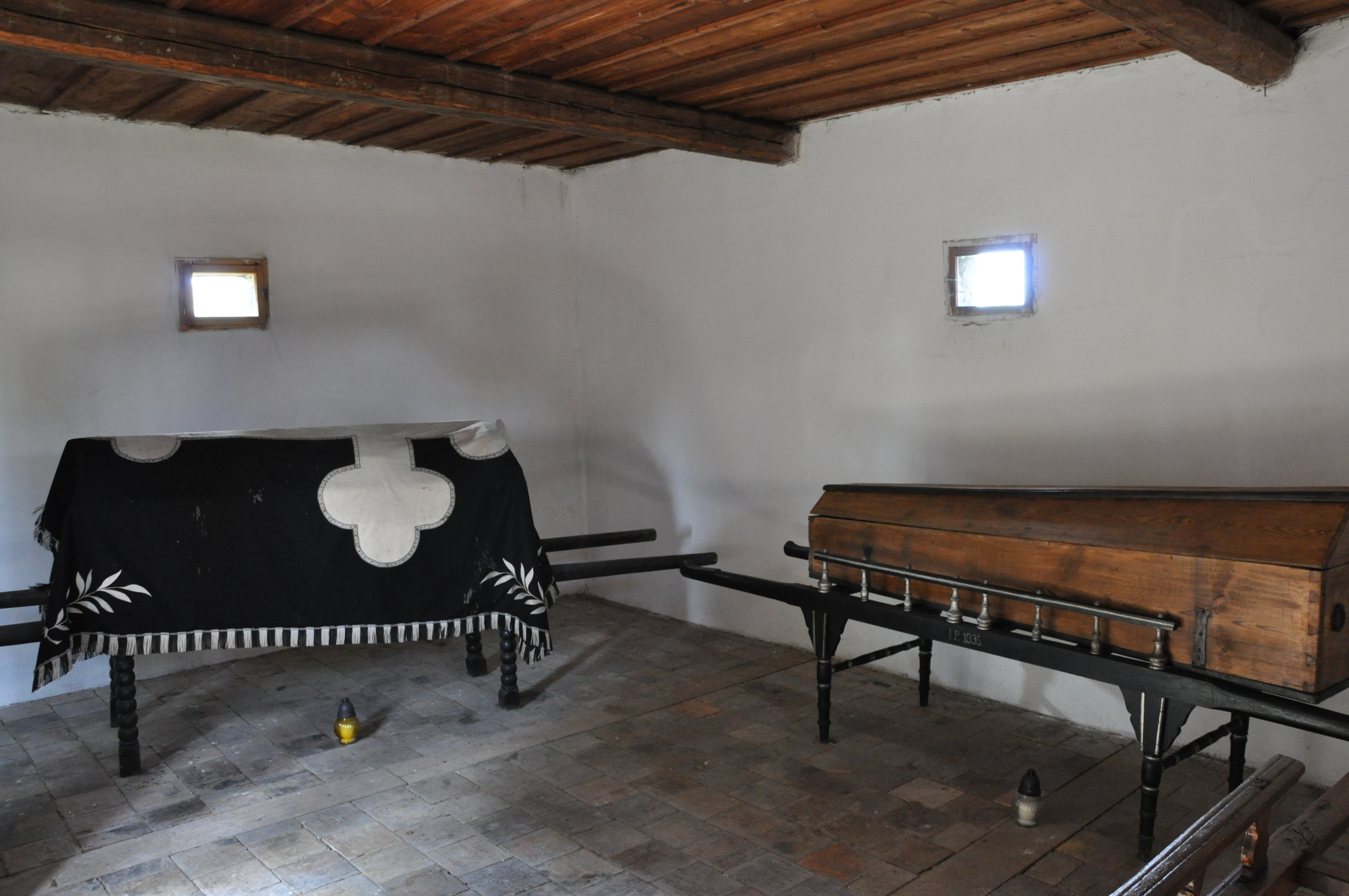 Veliny, okres Pardubice. Josefinská rakev.